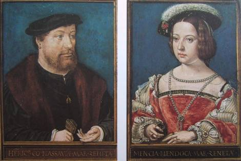 Heinrich III. (Nassau) (1483-1538) und seine dritte Ehefrau Mencia de Mendoza (1508-1554)